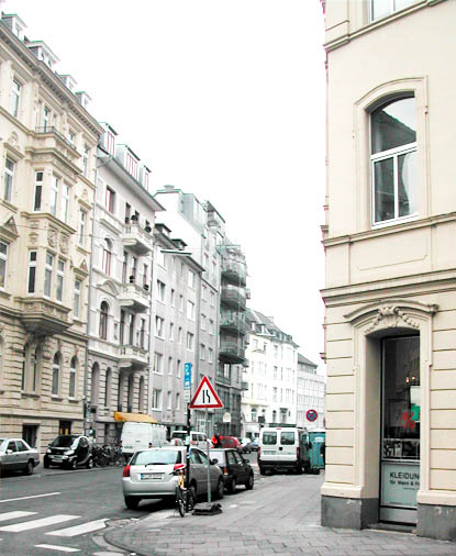 Belgisches Viertel, neighbourhood